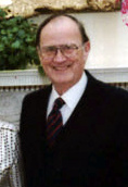 Lance Adams-Schneider